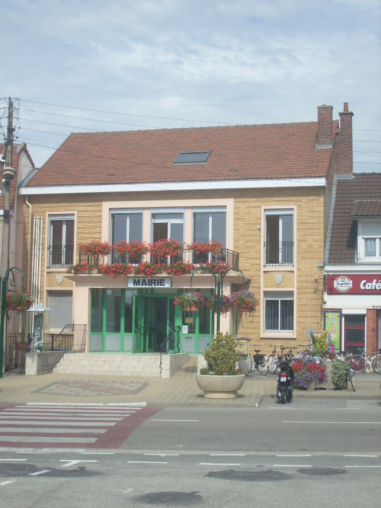 Mairie de Ghyvelde